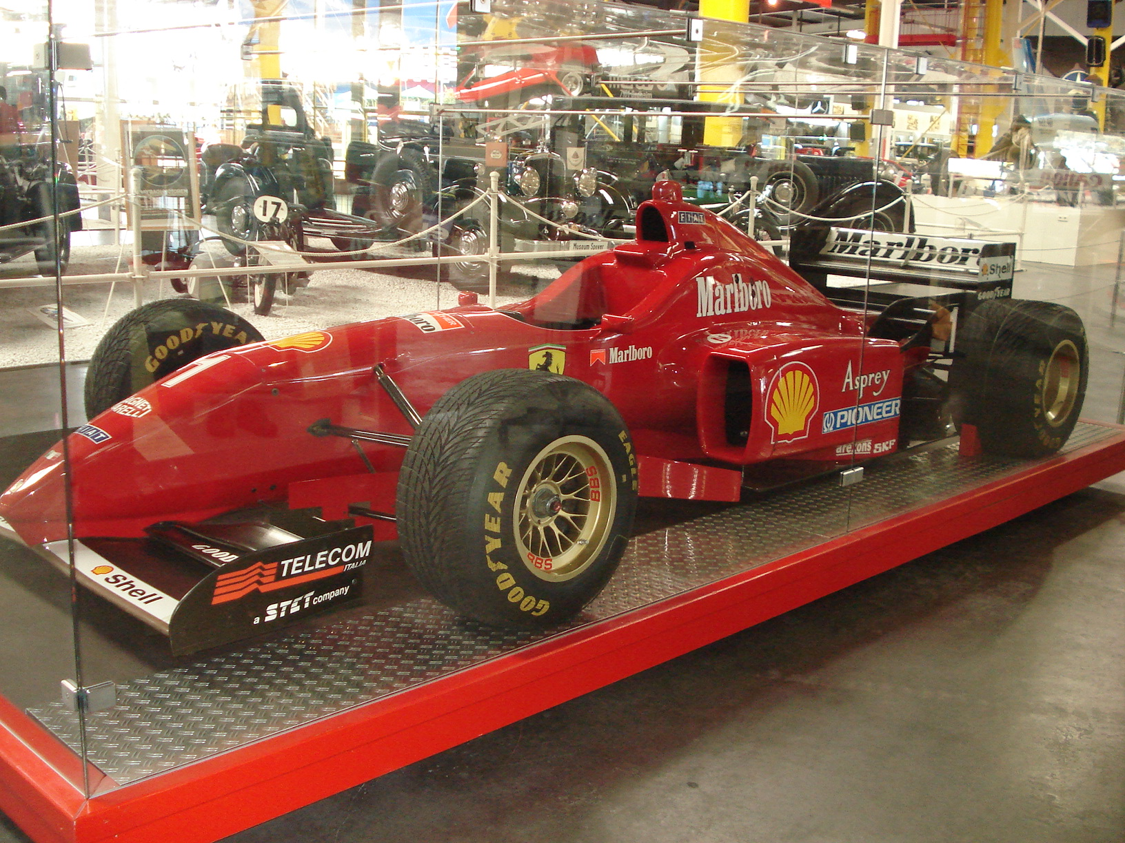 Bild eines Ferrari Formel 1 Wagens.